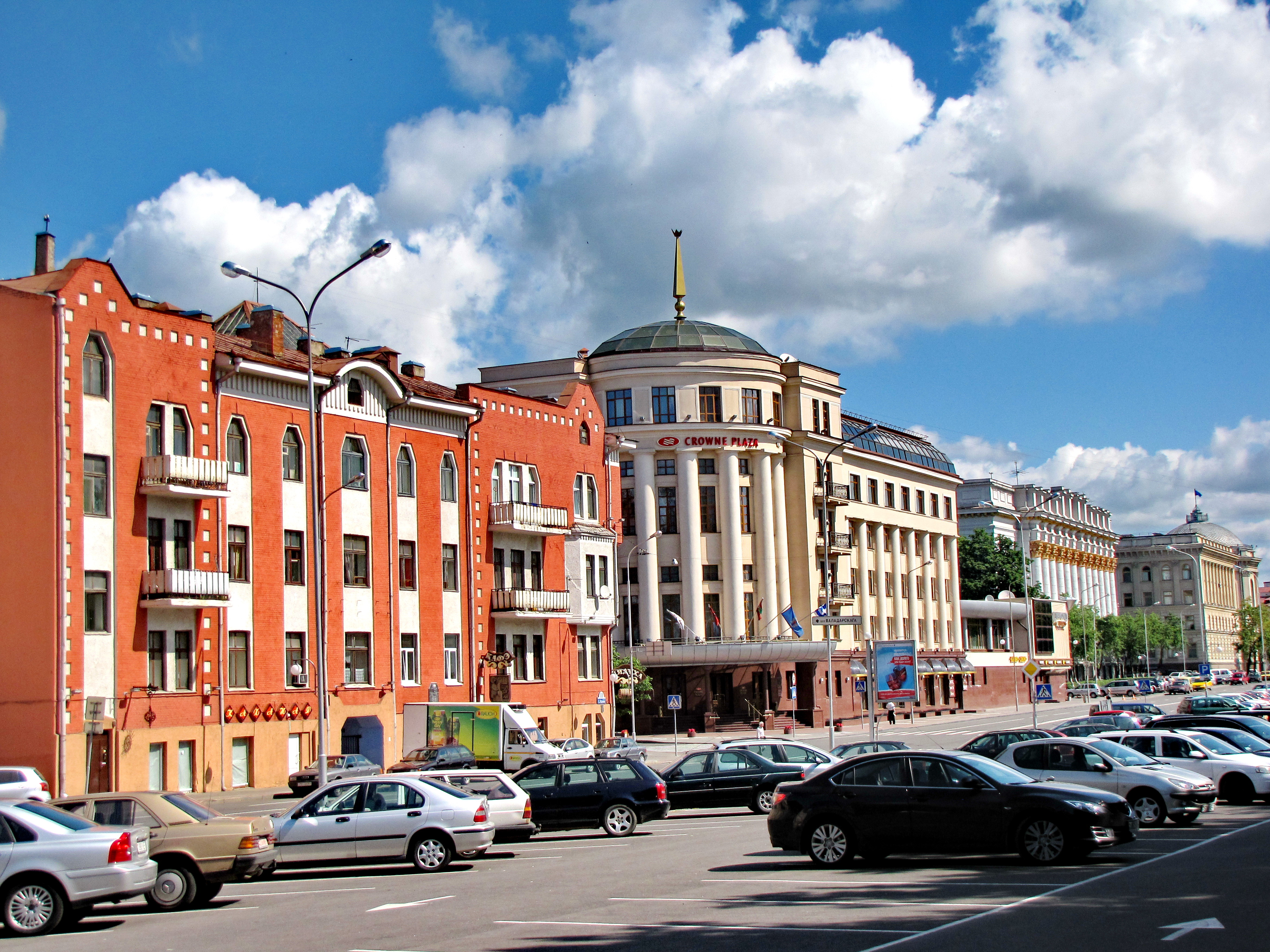 Беларуская (тарашкевіца): Будынак былога гатэлю «Сьвіслач». г. Менск This is a photo of Belarusian heritage monument. Reference number: 712Г000071 ( WLM)